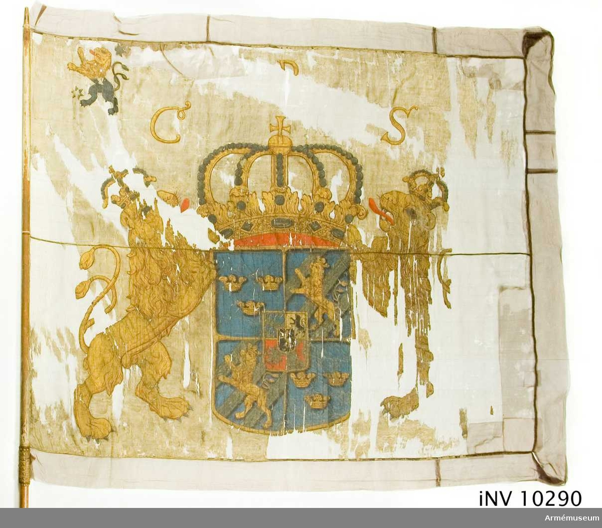 Livfana m/1686 för Skaraborgs regemente. AM.010290